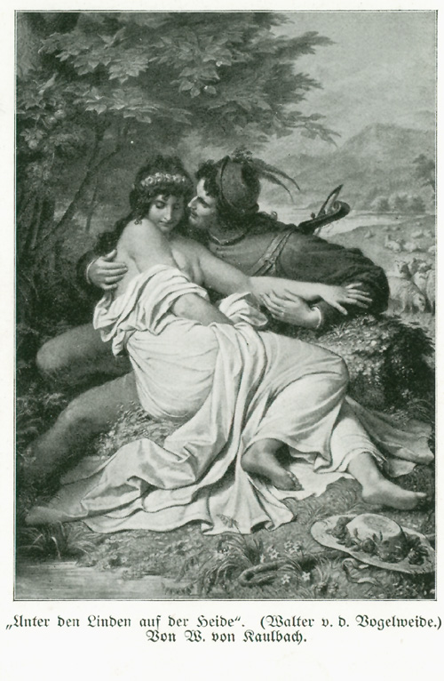 Illustration zu dem Gedicht „Unter der Linden“ von Walter von der Vogelweide